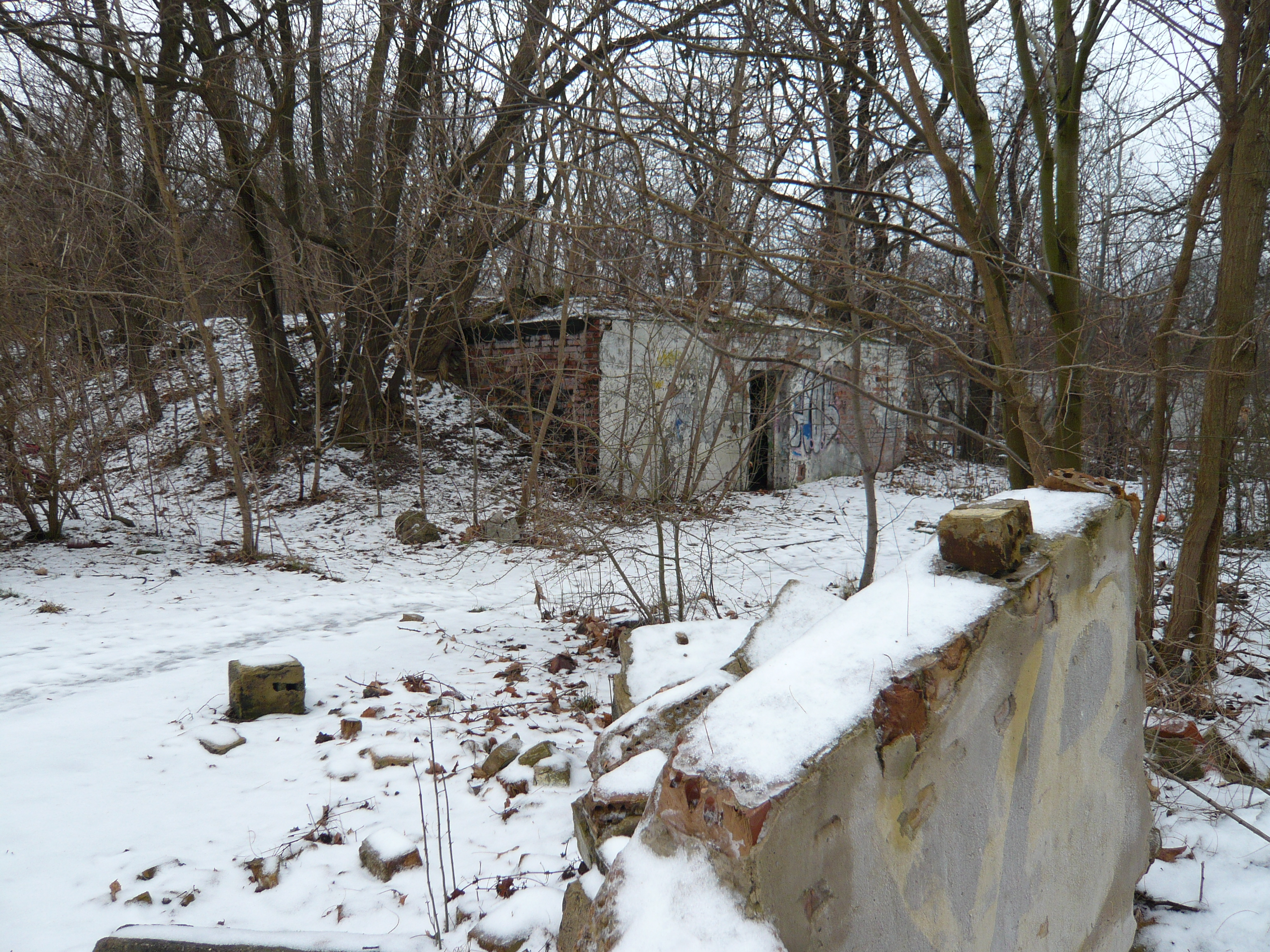 altes Lichtenberger Stadion, Reste der alten Tribüne